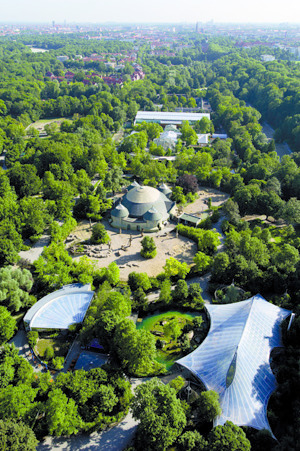 Der Tierpark Hellabrunn aus der Vogelperspektive